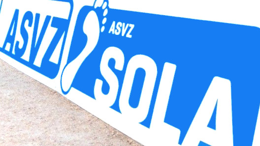 Logos ASVZ und SOLA am Board in einem der Ziele der SOLA-Stafette 2018